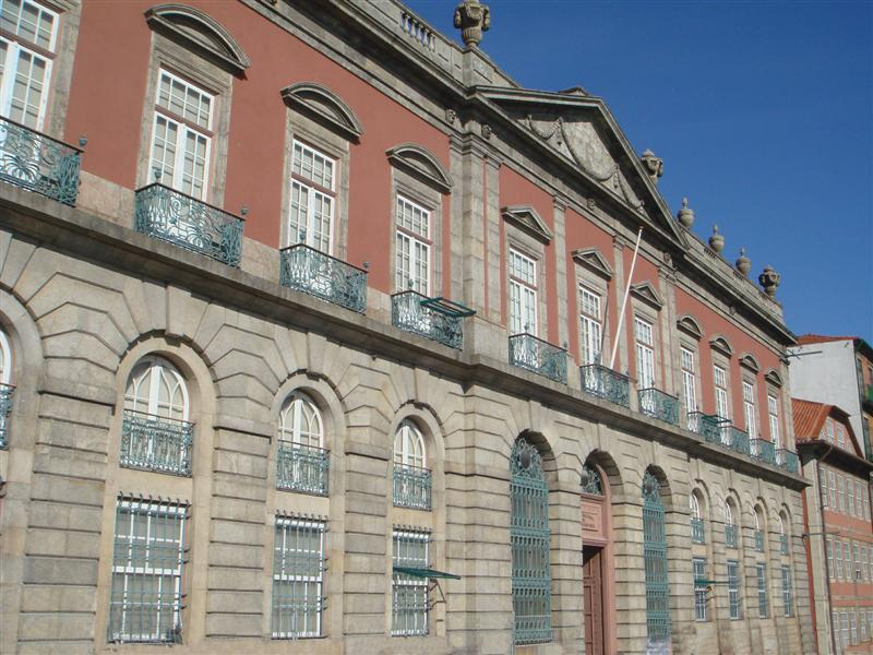 Carrancas Palace in Porto Portugal